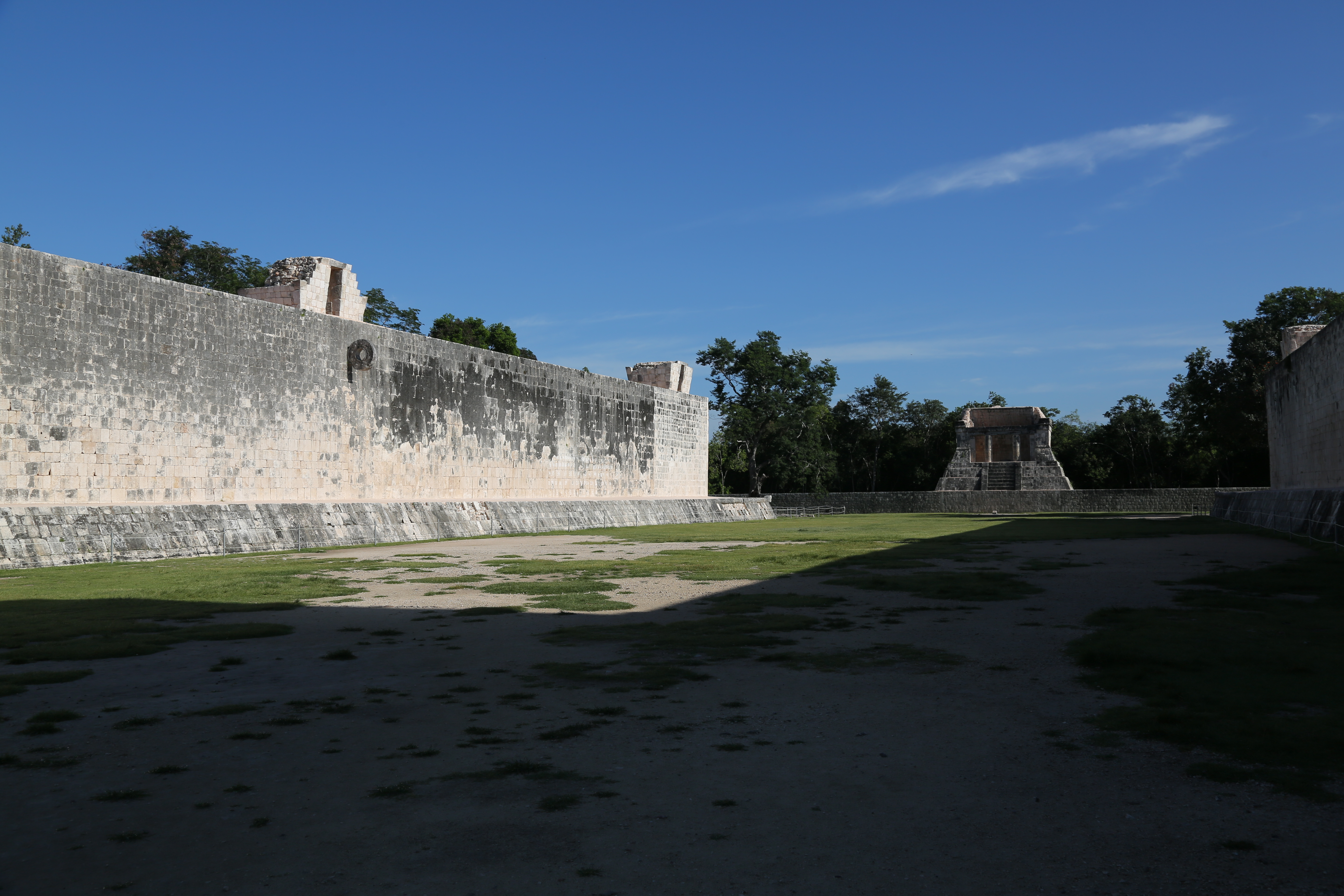 Campo para el juego de pelota en Chichén Itza